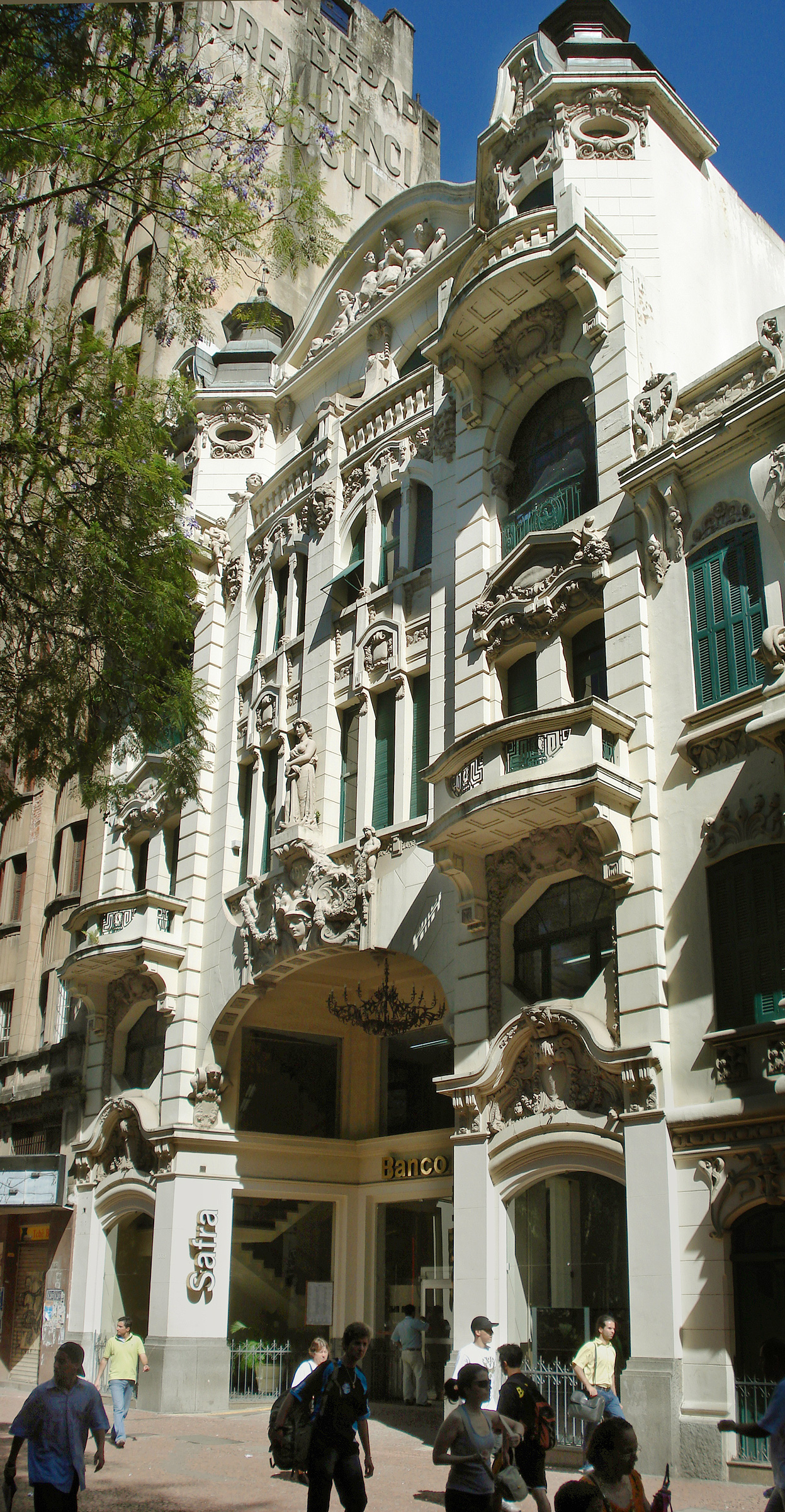 Prédio da antiga Previdência do Sul, hoje Banco Safra, em Porto Alegre, Brasil. Projeto de Theodor Wiederspahn, engenharia de Rudolf Ahrons. Decoração de João Vicente Friedrichs, estatuária de Wenzel Folberger. Inaugurado em 1913.